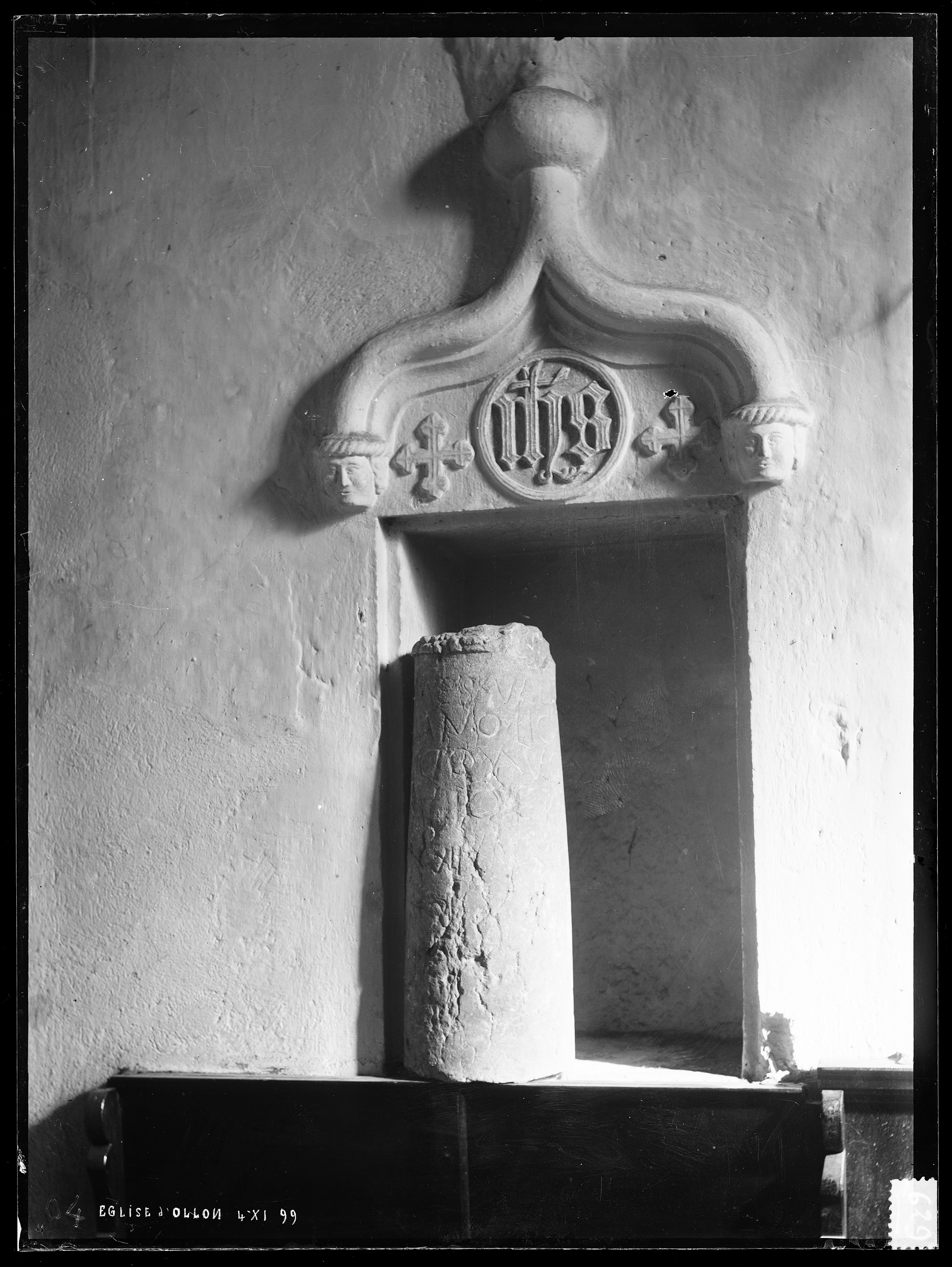 Milliaire romain placé dans la crédence de l'église réformée anciennement Saint-Victor